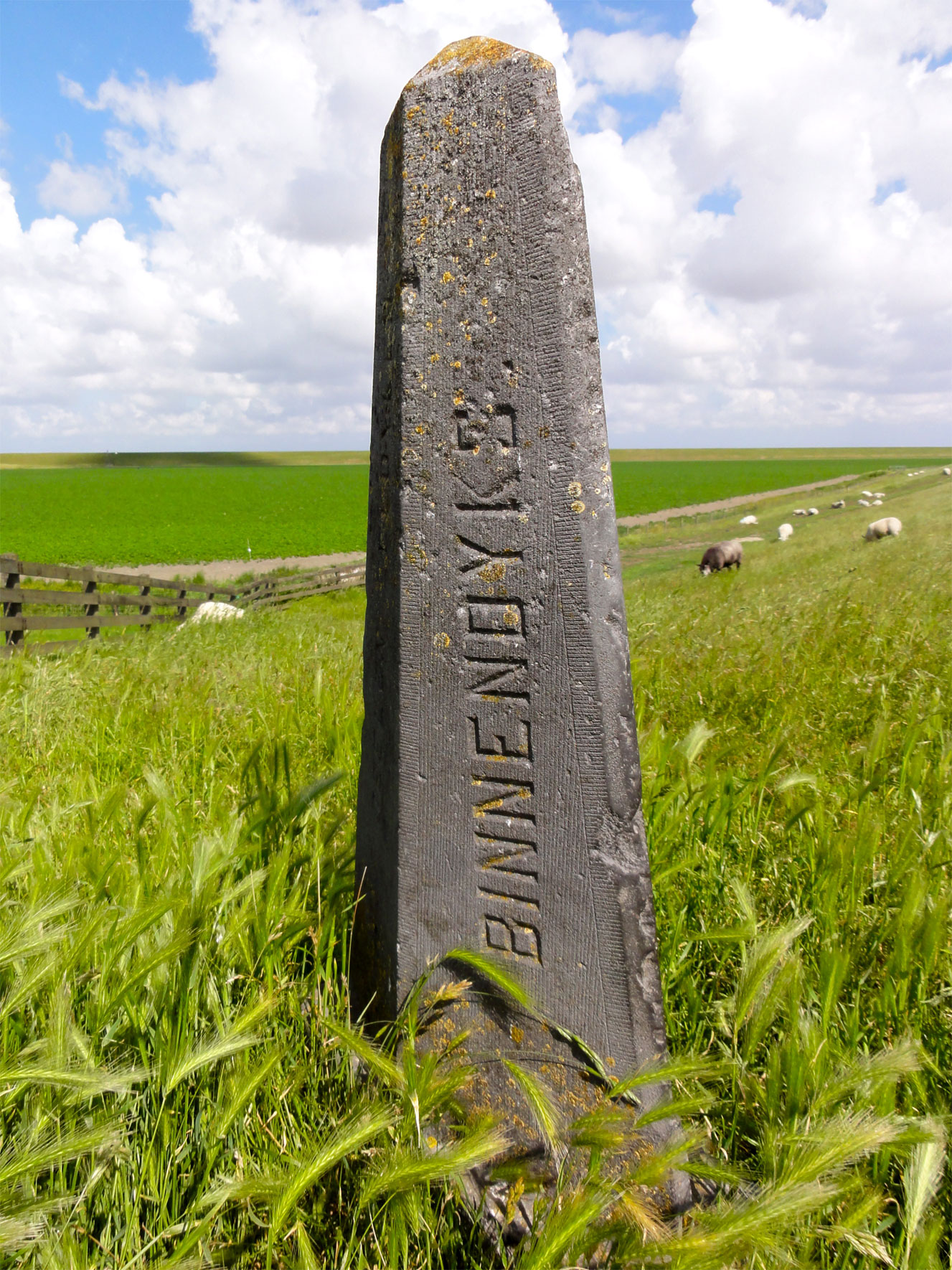 Terminus grenspaal tussen Het_Bildt en het oude land van Westergo